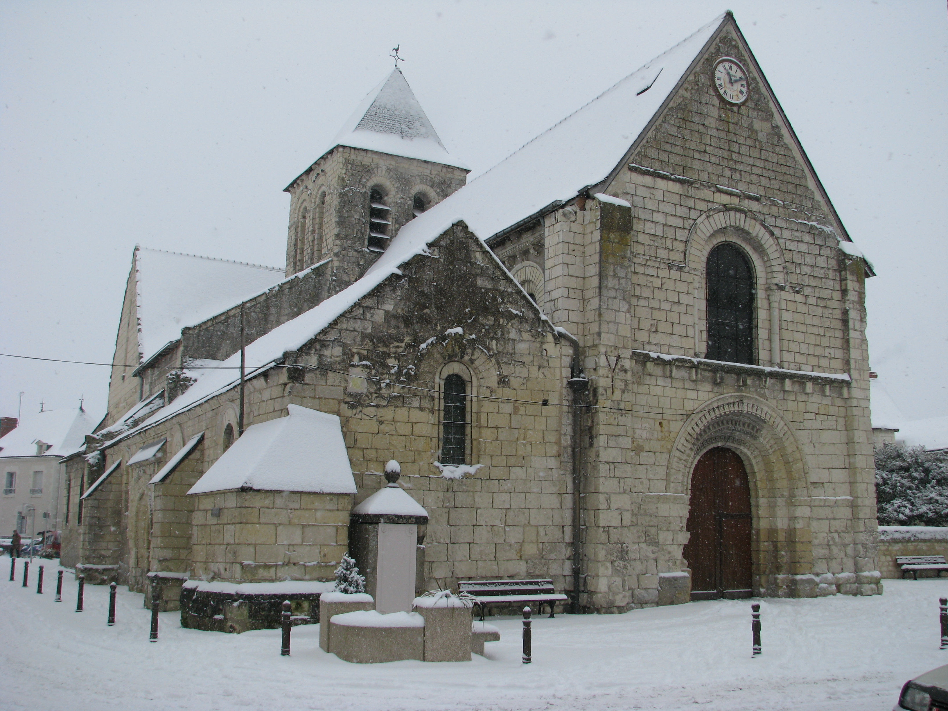 L'Ile-Bouchard - Eglise Saint-Gilles sous la neige